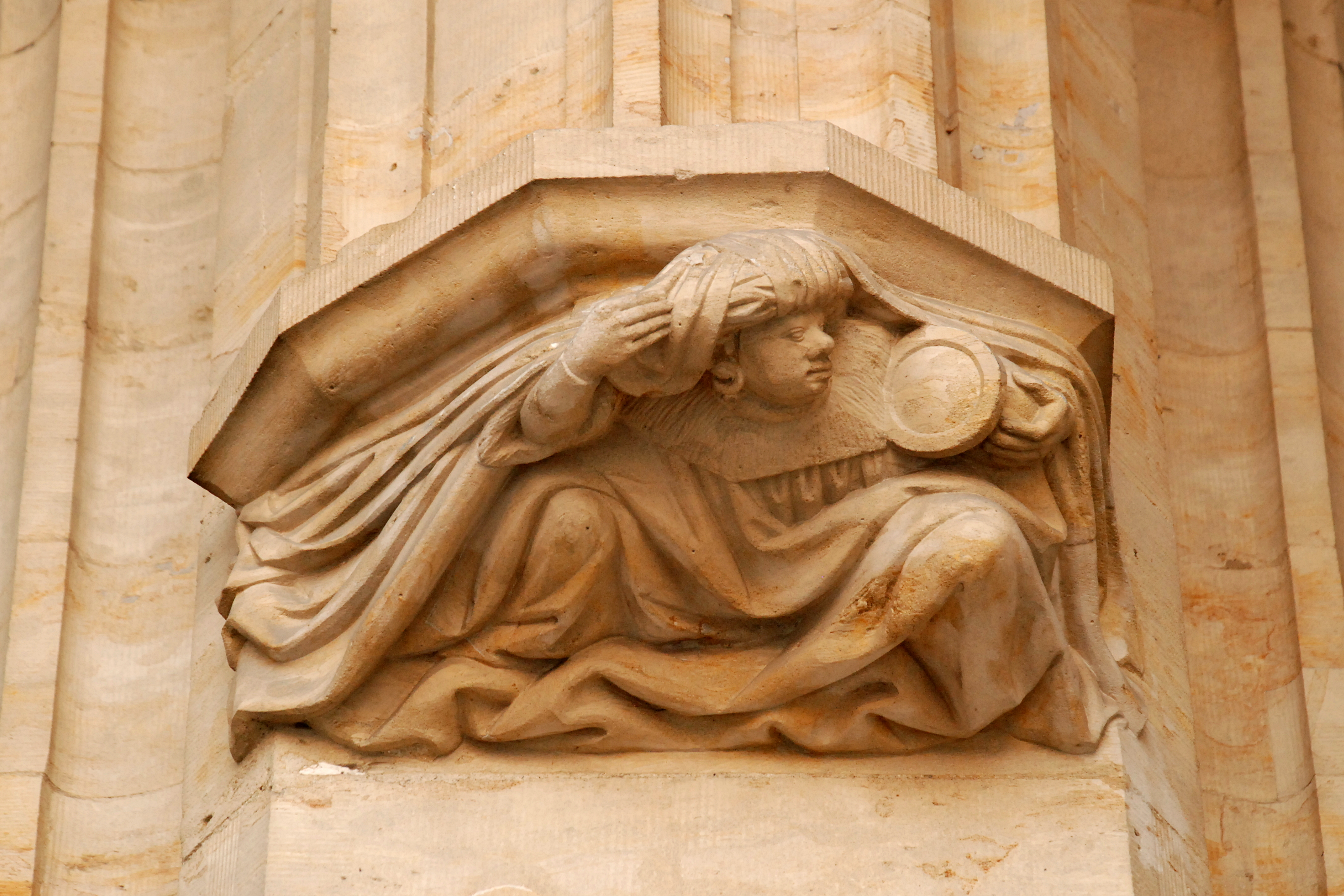 Belgique - Bruxelles - Grand-Place - Maison du Maure